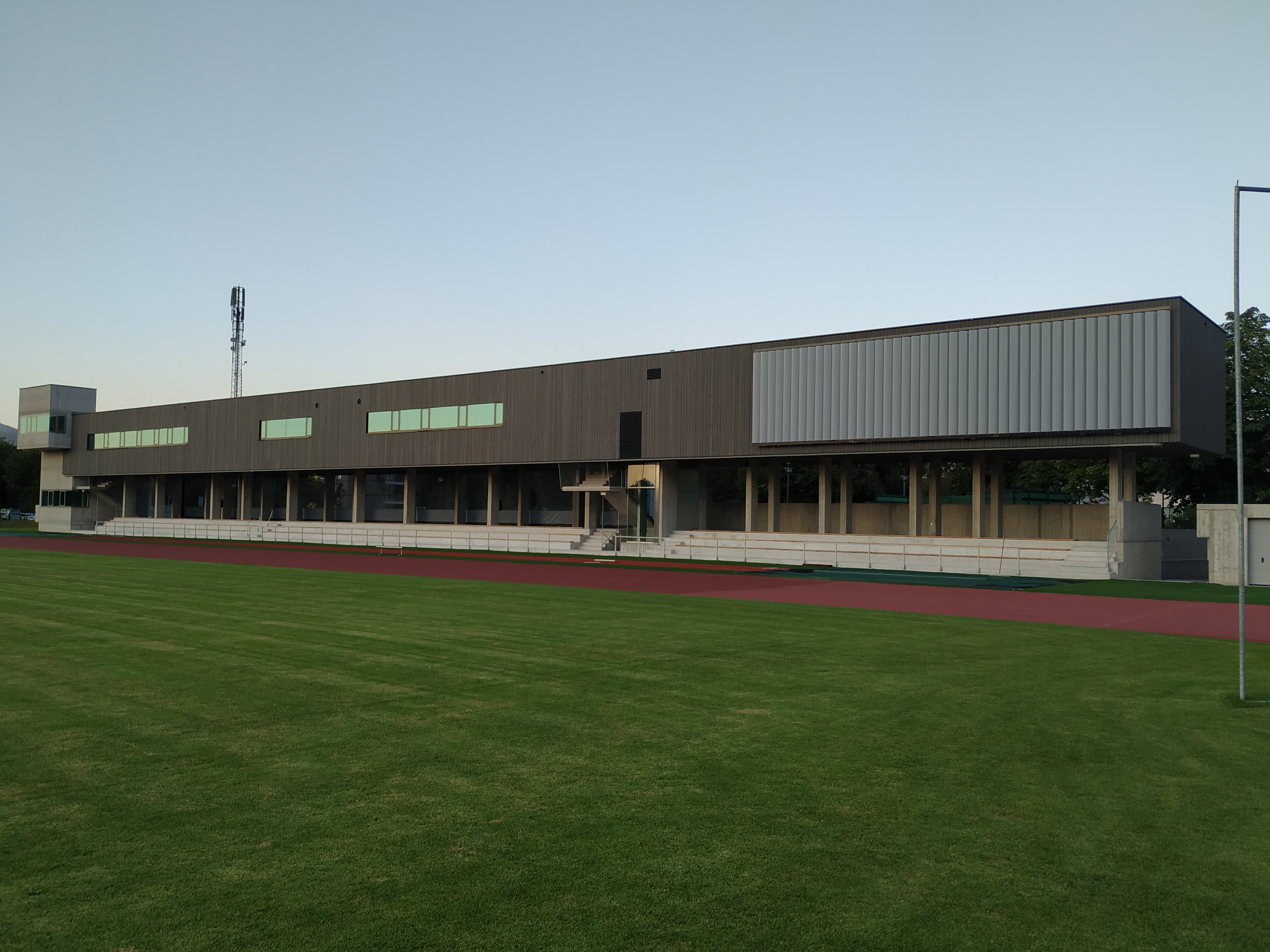 ULSZ Rif, Hallein, Österreich